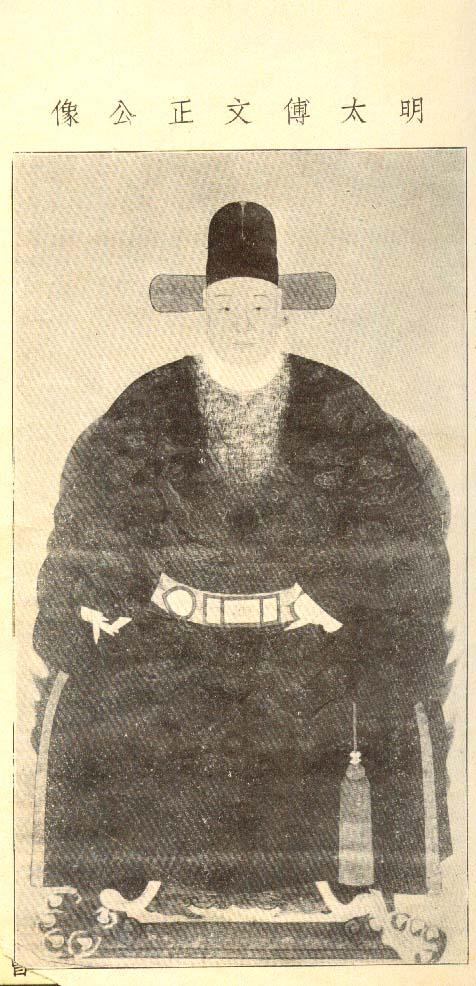 [明] 谢迁像 现藏宁波天一阁 来自 此图为二维平面艺术（古画），作者逝世已逾百年，无特殊版权。 参见：民国图书，《明代四门谢氏24祖像》